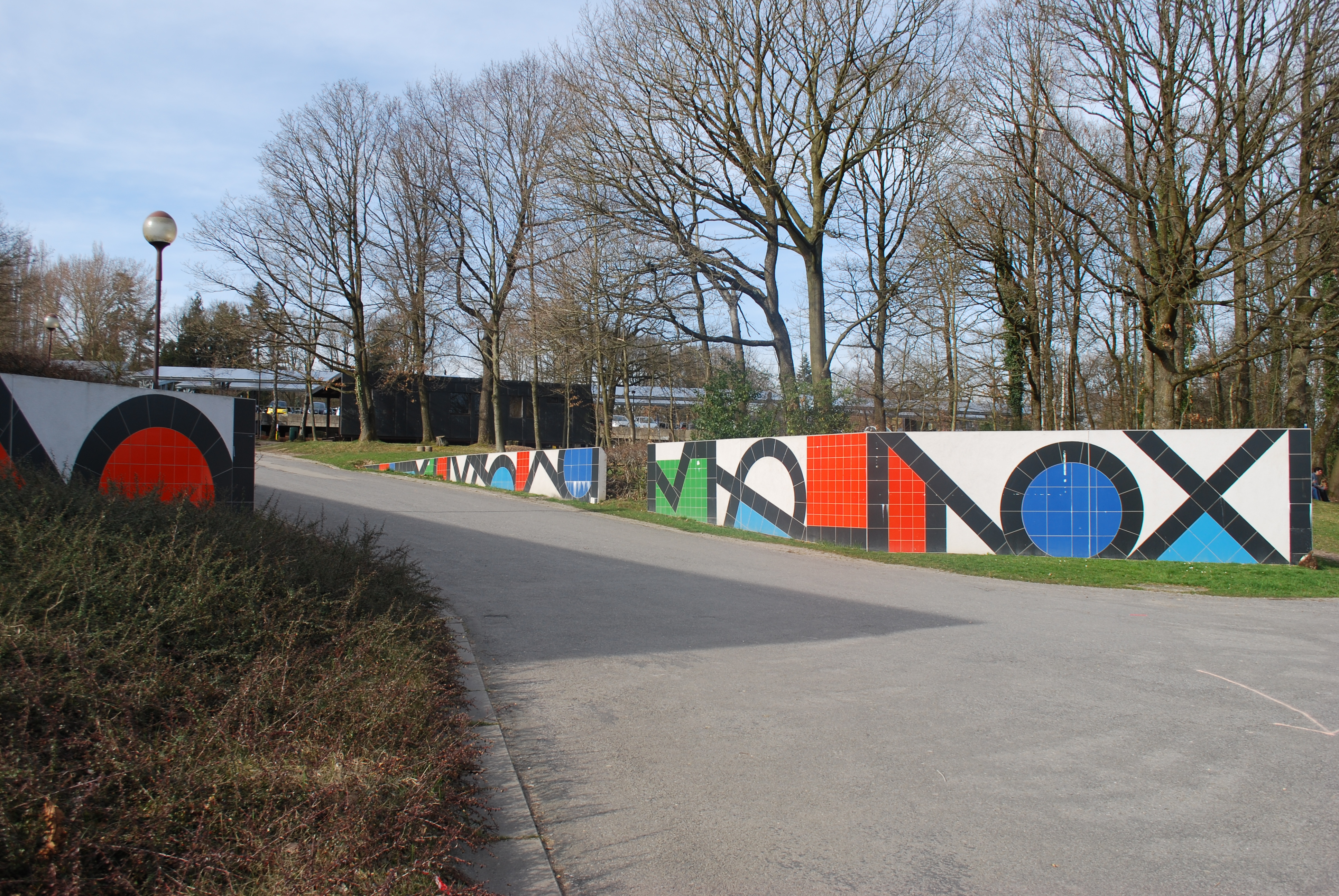 Vue du quartier Agora, dans le domaine de l'Université de Liège au Sart Tilman.